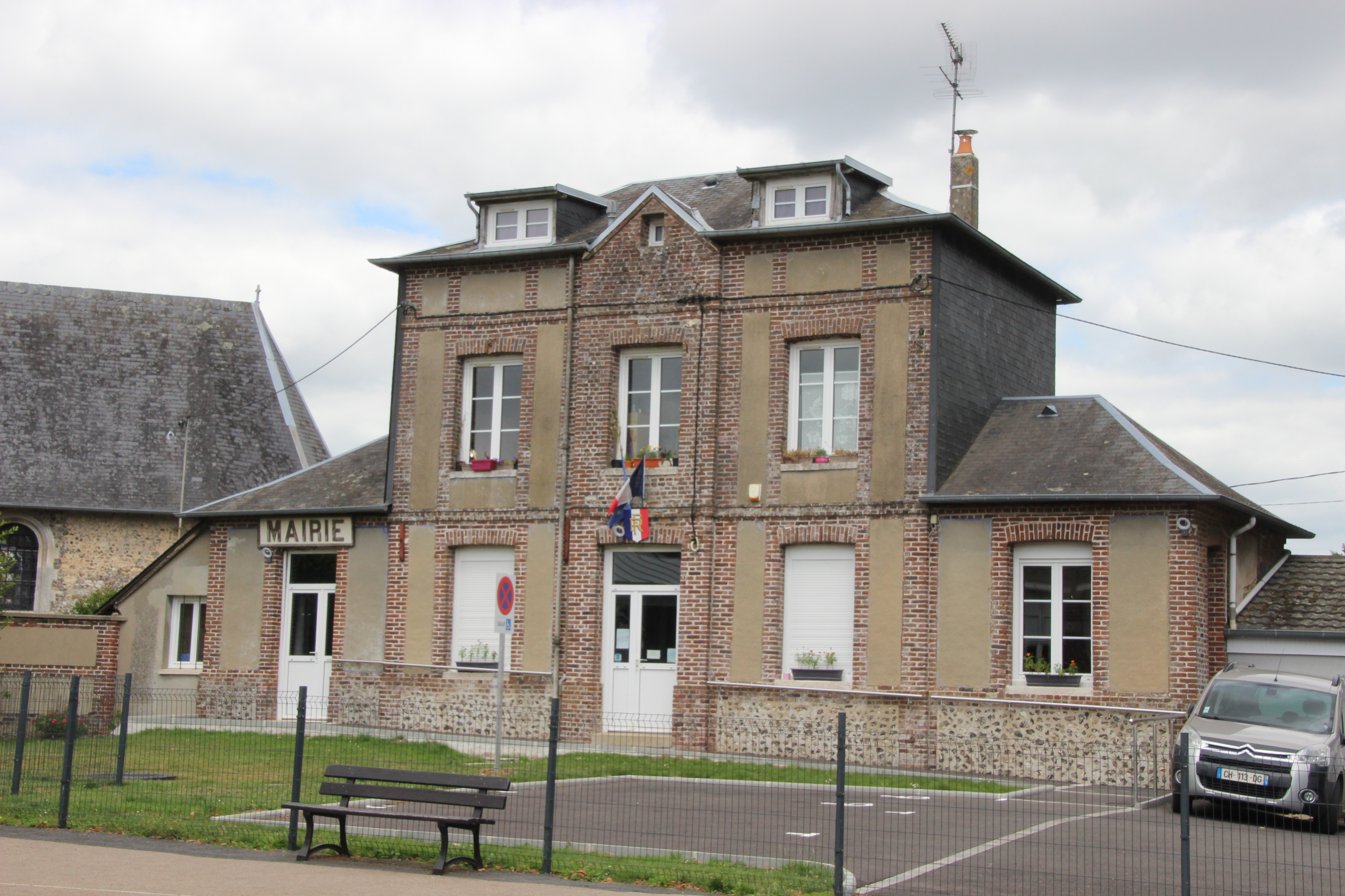 mairie Longuerue